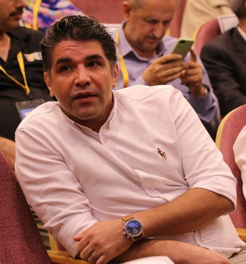 گزارش تصویری از مراسم معارفه و نشست خبری آندره‌آ استراماچونی در تیم استقلال